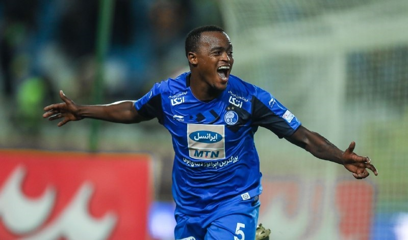 گزارش تصویری از بازی سپاهان و استقلال